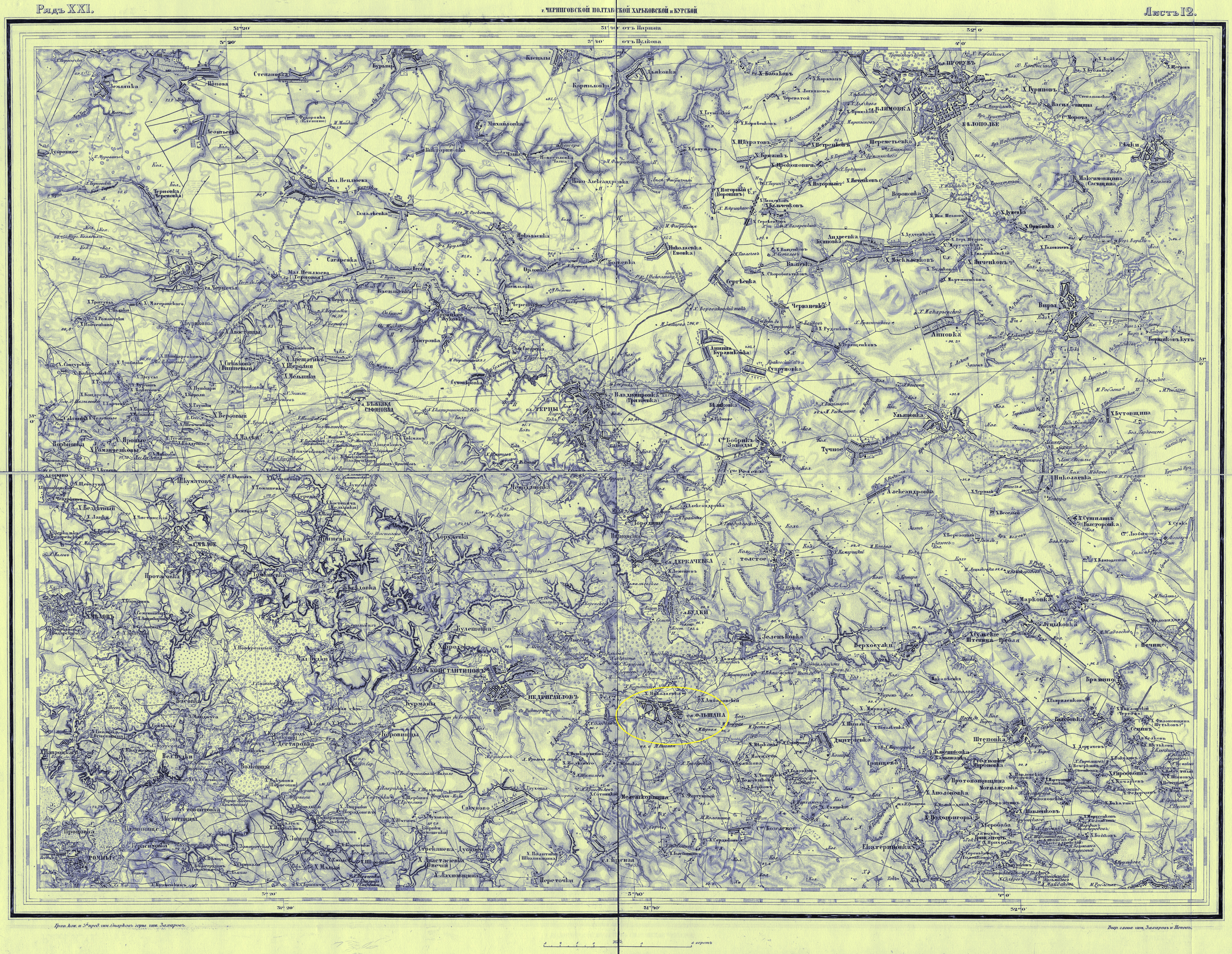 Царская Ольшана